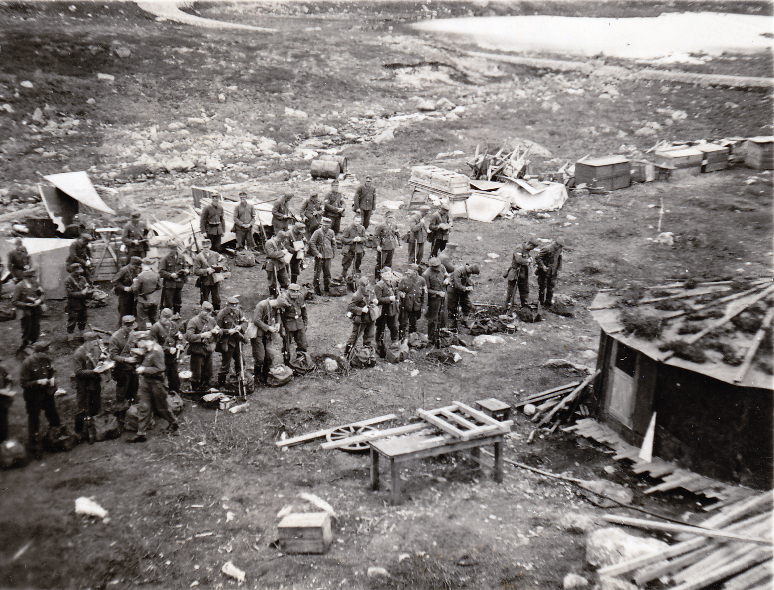 1943-44 François Schneider (5e, 3e rangée) dans l'OT au Schwabenweg am Fischerhals en Finlande. Franz Schneider sera requis de rejoindre l'Organization Todt (OT) à Berlin le 18 mai 1943. De là, il sera envoyé comme charpentier en Finlande et plus tard en Norvège. L'Organisation Todt (OT) était un groupe de génie civil et militaire de l'Allemagne nationale-socialiste.